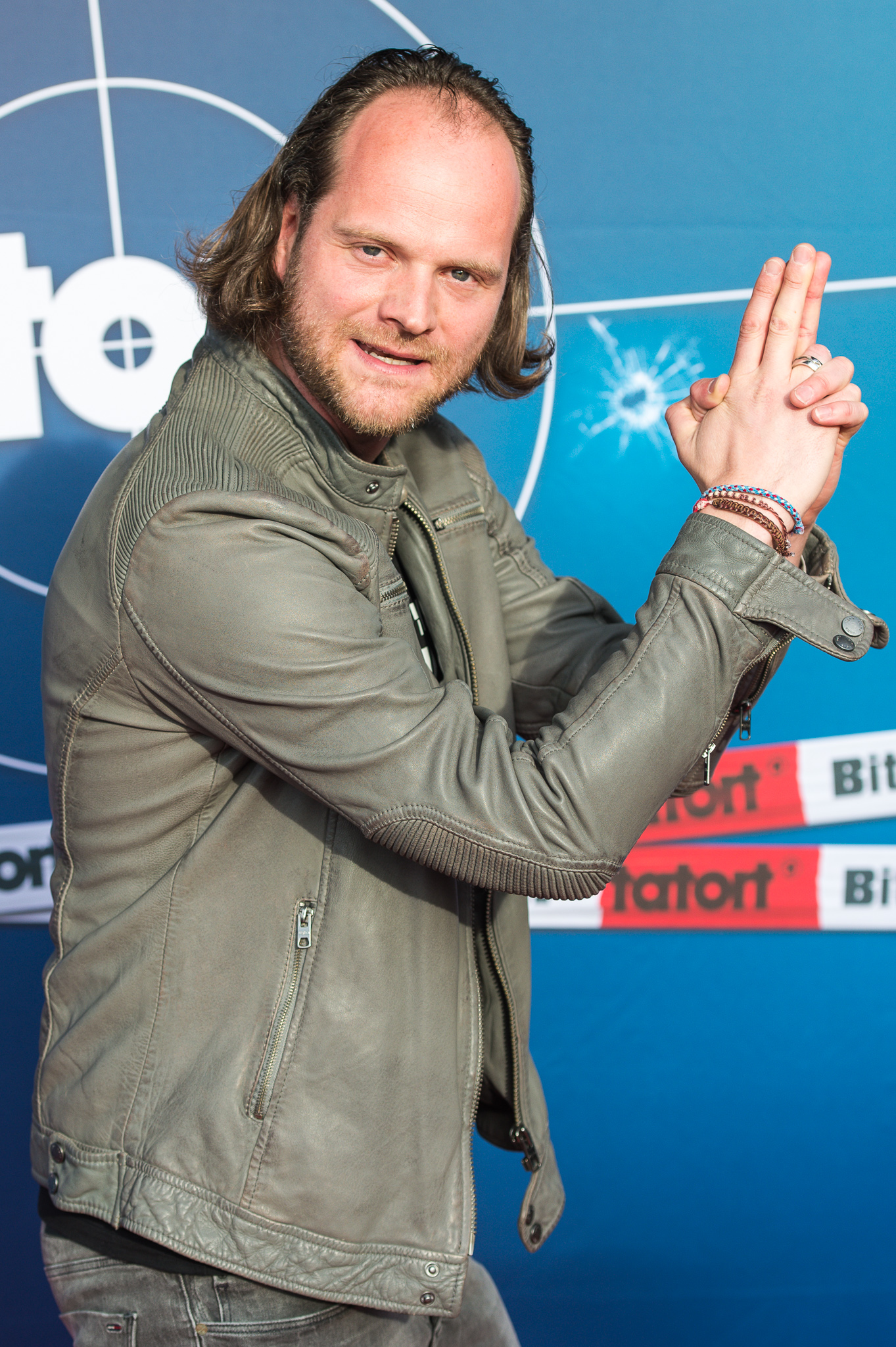 Andreas Leopold Schadt,Cinecitta,Der Himmel ist ein Platz auf Erden,Premiere Franken-Tatort,Schauspieler,Tatort